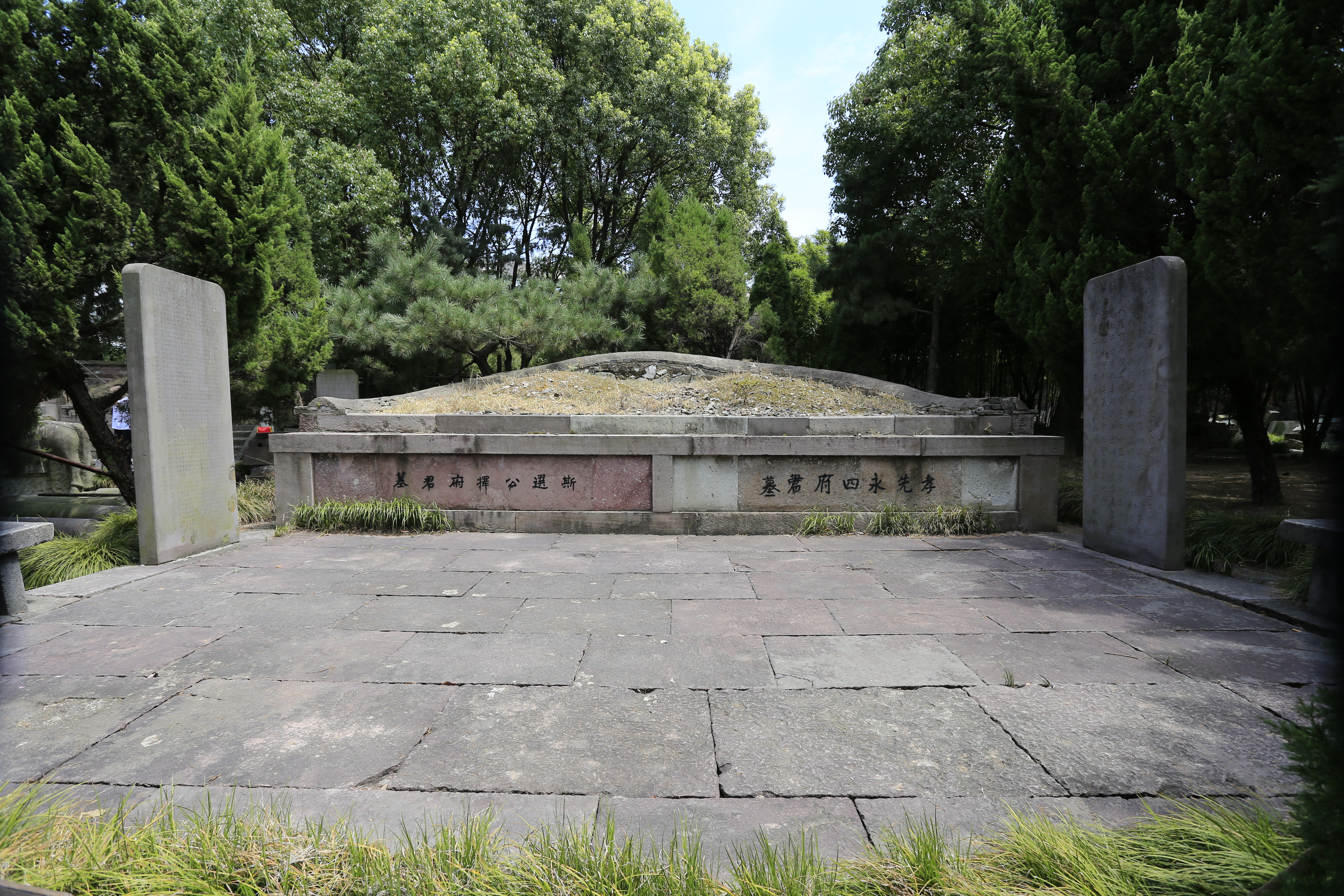 宁波白云庄 —— 万斯选墓